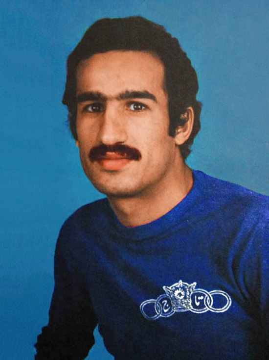 Gholam Hossein Mazloumi